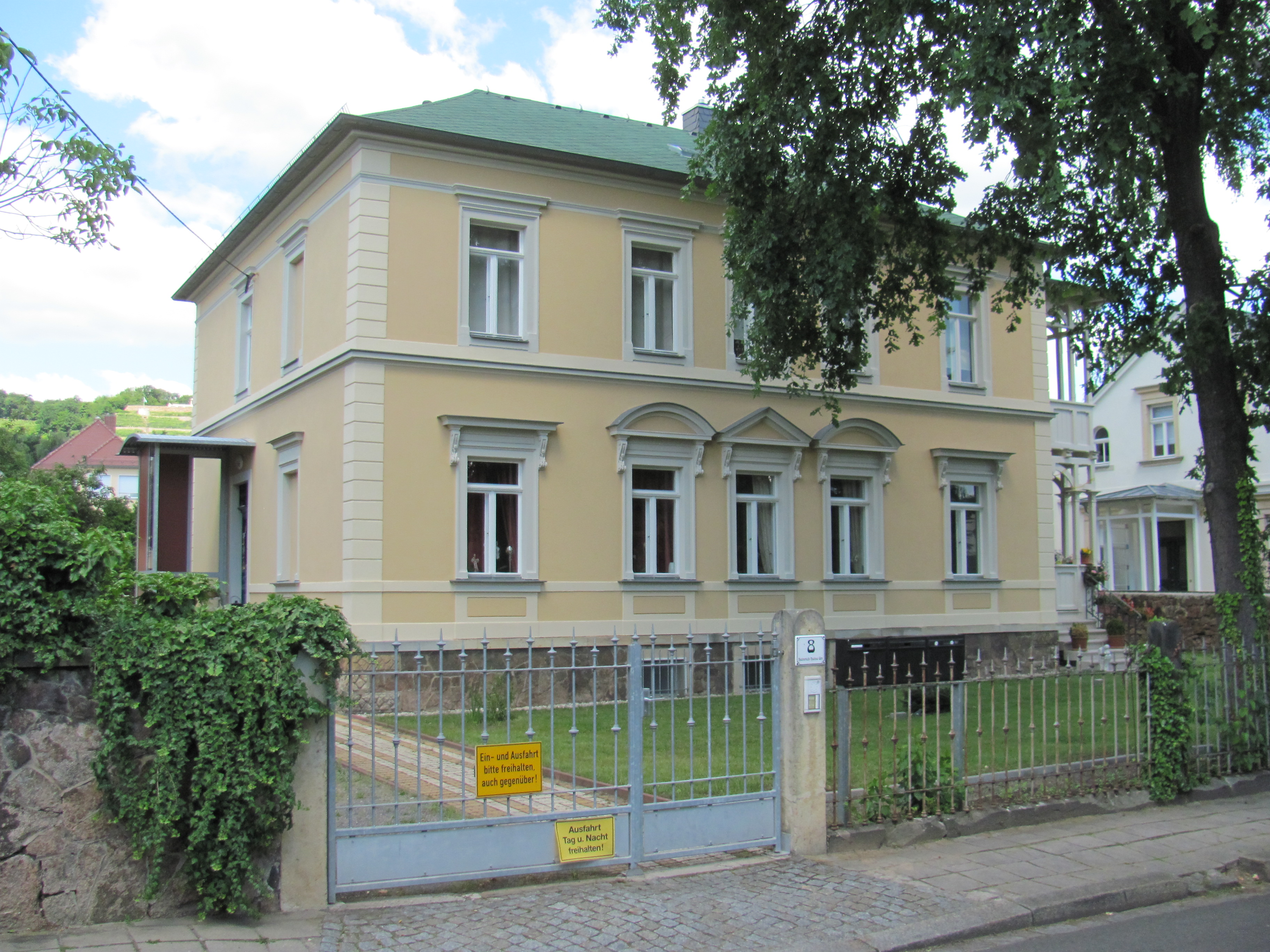 Fehlende Kulturdenkmale nach Wikipedialiste in Heinrich-Heine-Straße, Horst-Vieth-Straße, Humboldtstraße, Dr-Rudolf-Friedrichstraße